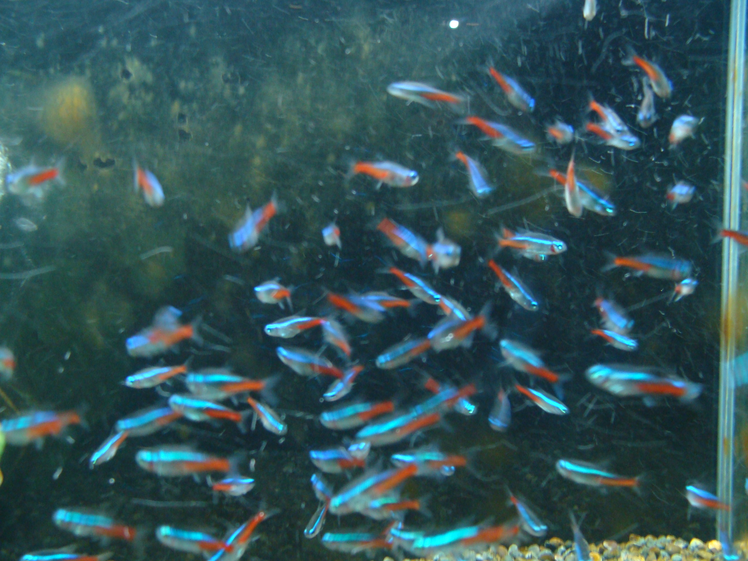 中文（台灣）: 小小魚001